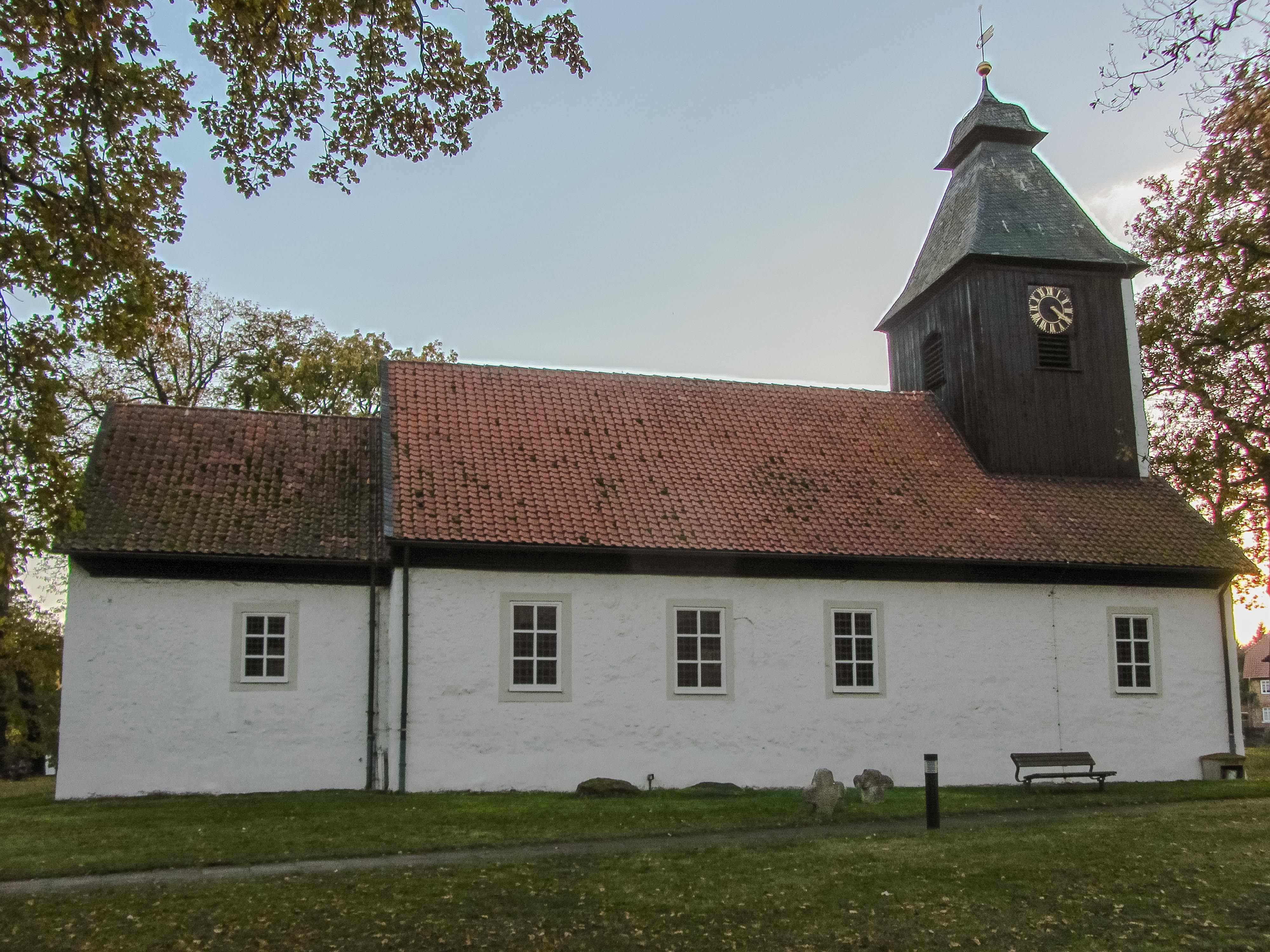 St.-Georg-Kirche Jembke